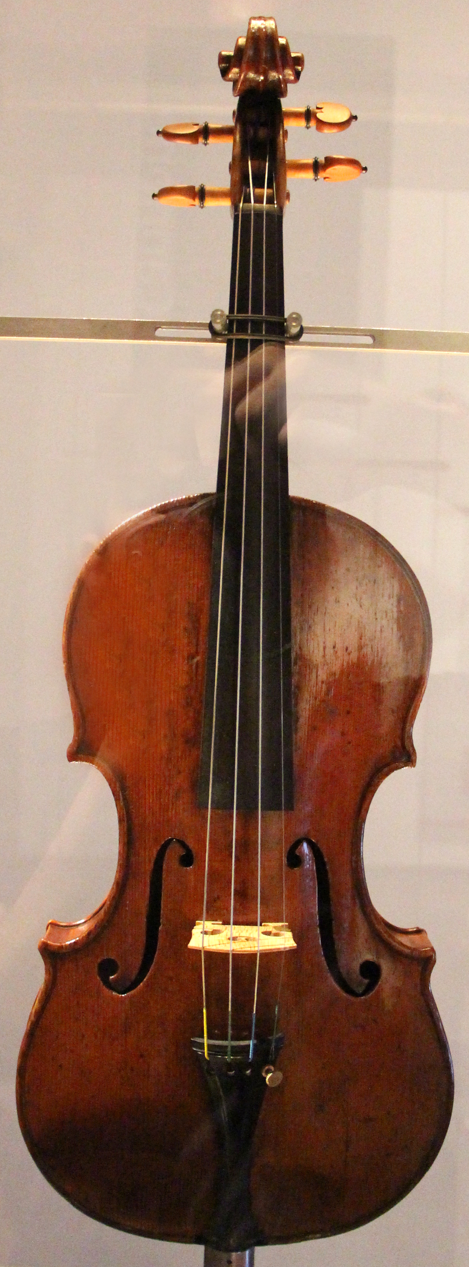 Palazzo Doria-Tursi - Musei di Strada Nuova This is a photo of a monument which is part of cultural heritage of Italy. The making of this document was supported by Wikimedia CH. (Submit your project!) For all the files concerned, please see the category Supported by Wikimedia CH.